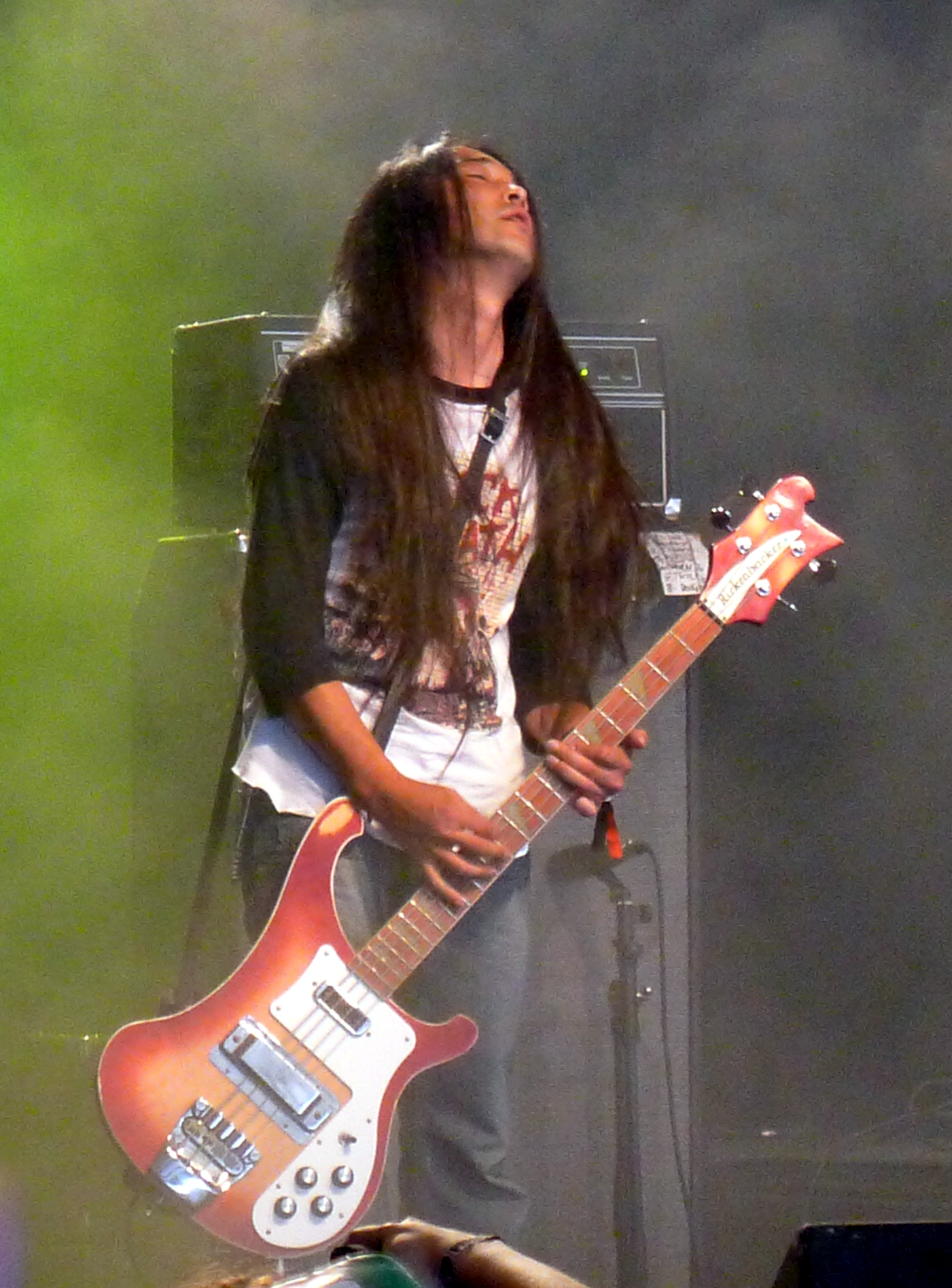 Church of Misery live am Tuska Open Air 2011